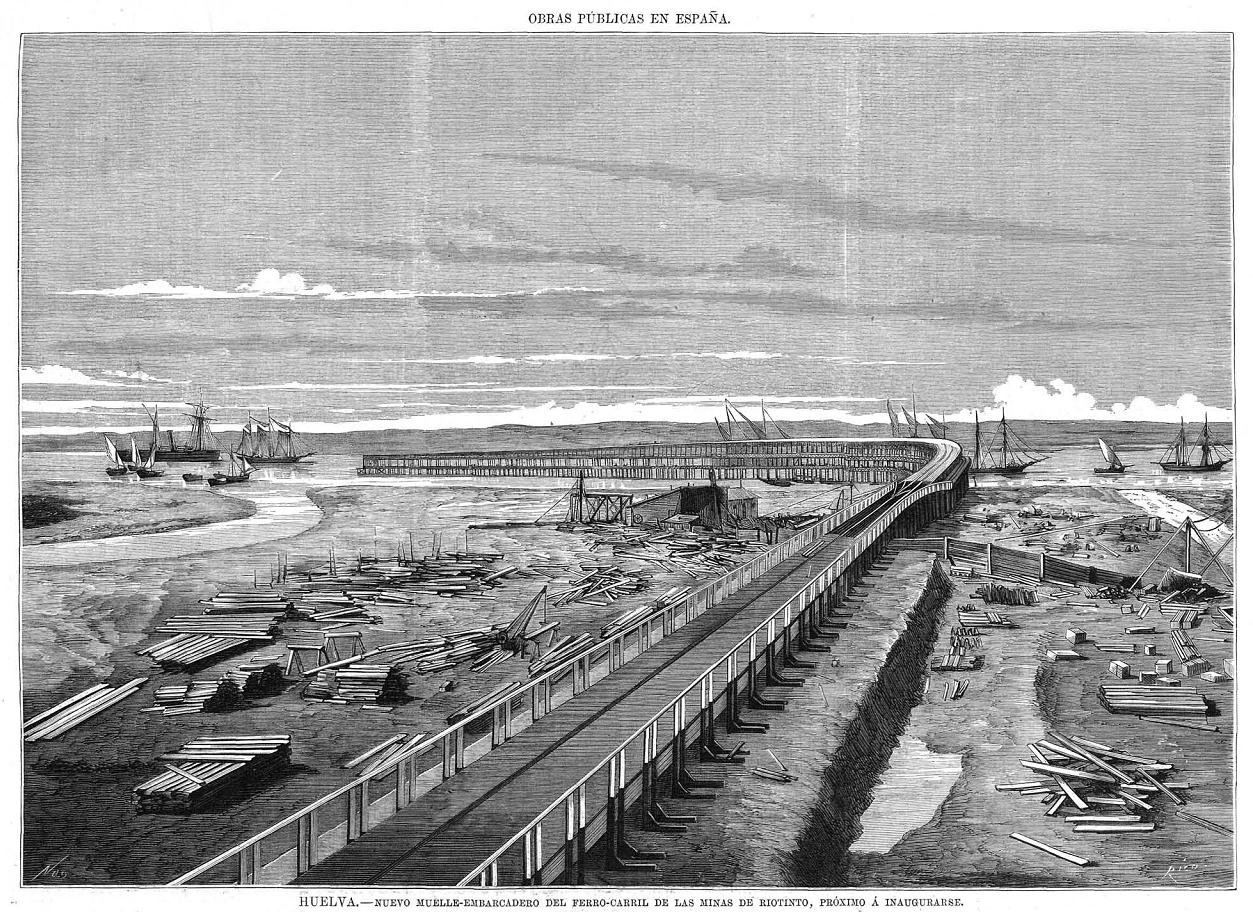 Huelva - Nuevo muelle-embarcadero del ferrocarril de las Minas de Riotinto, próximo a inaugurarse, en La Ilustración Española y Americana.